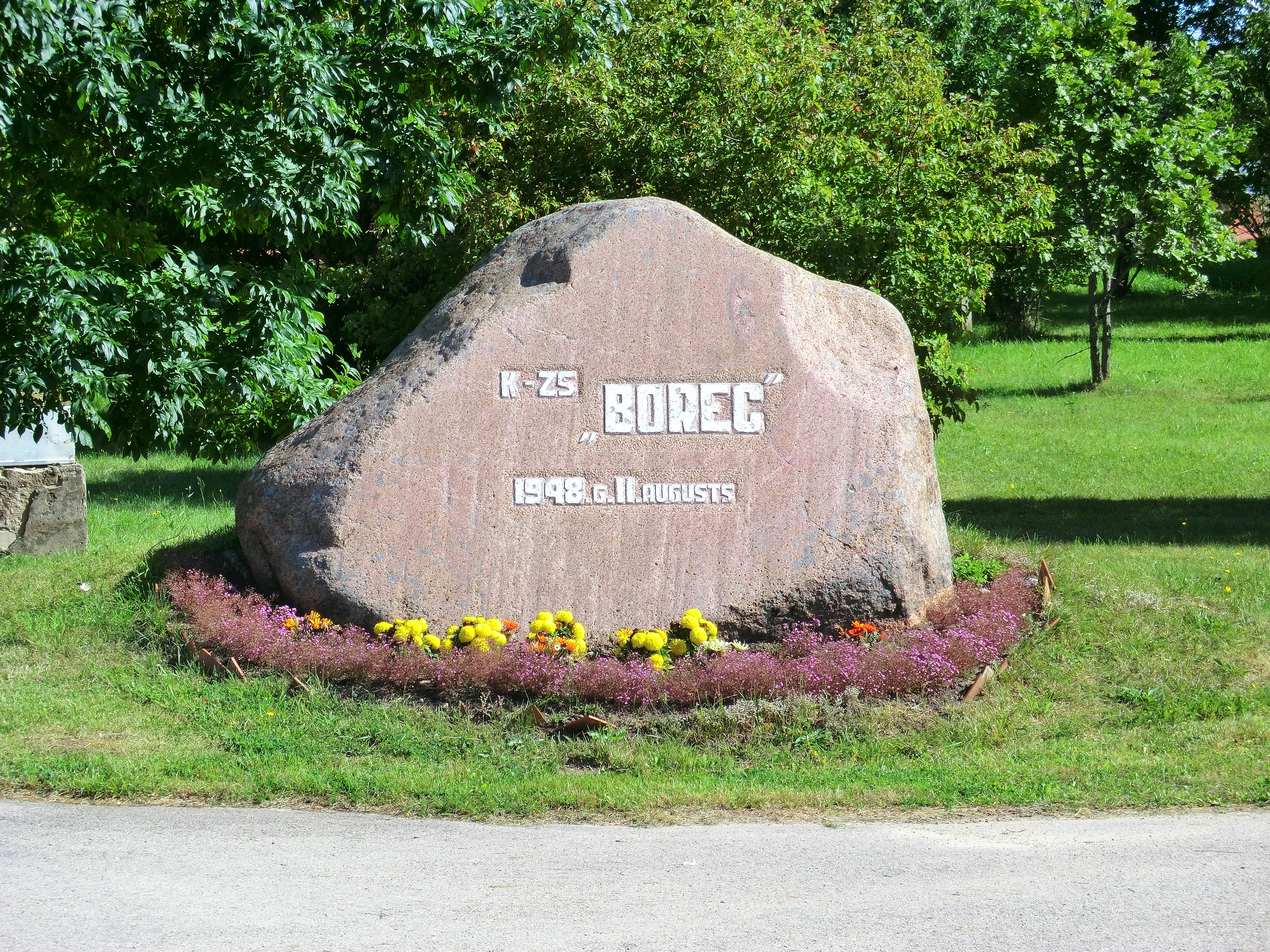 памятный камень Борцу